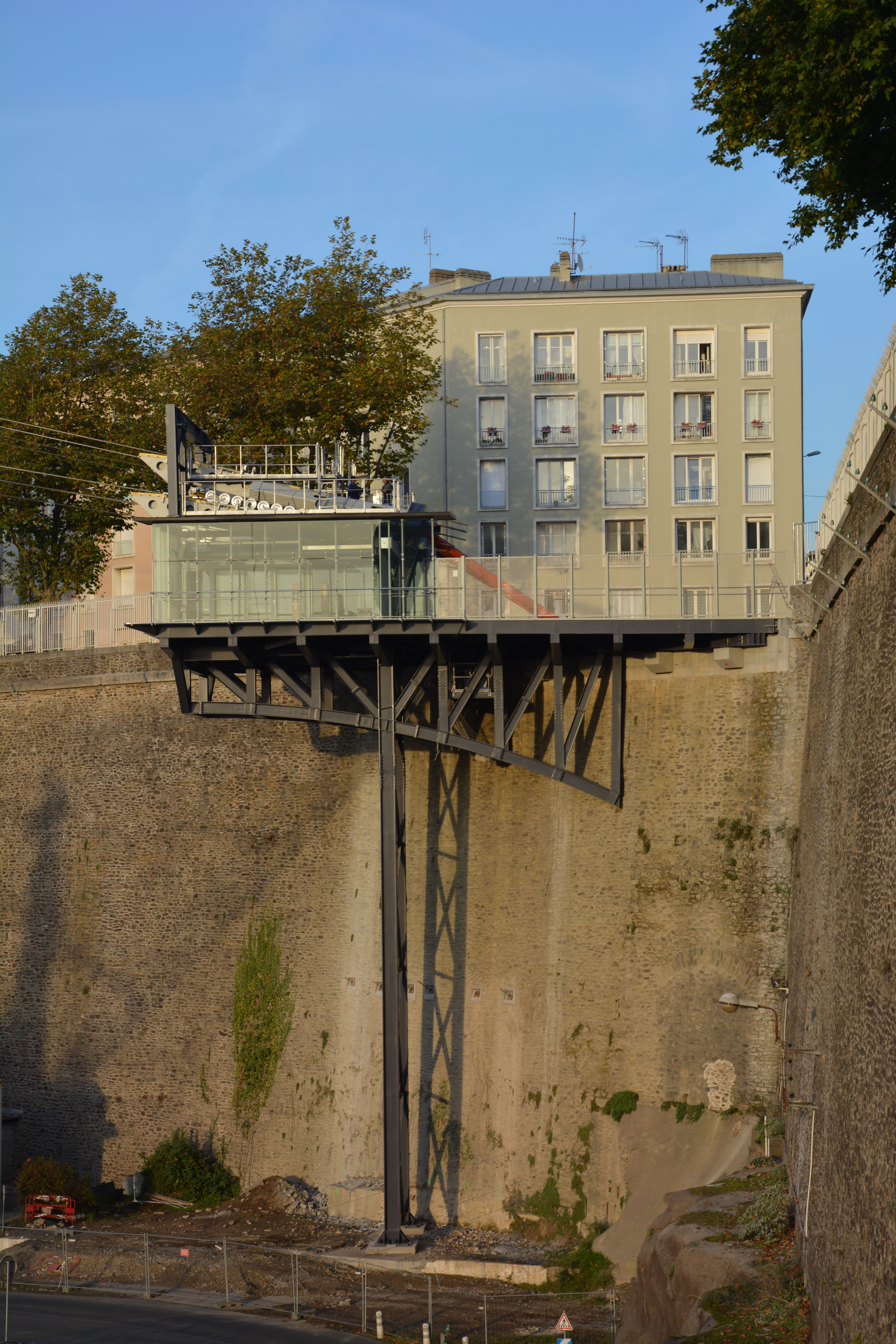 vue de la station Siam du téléphérique en installation au dessus de la Penfeld (Brest, France)